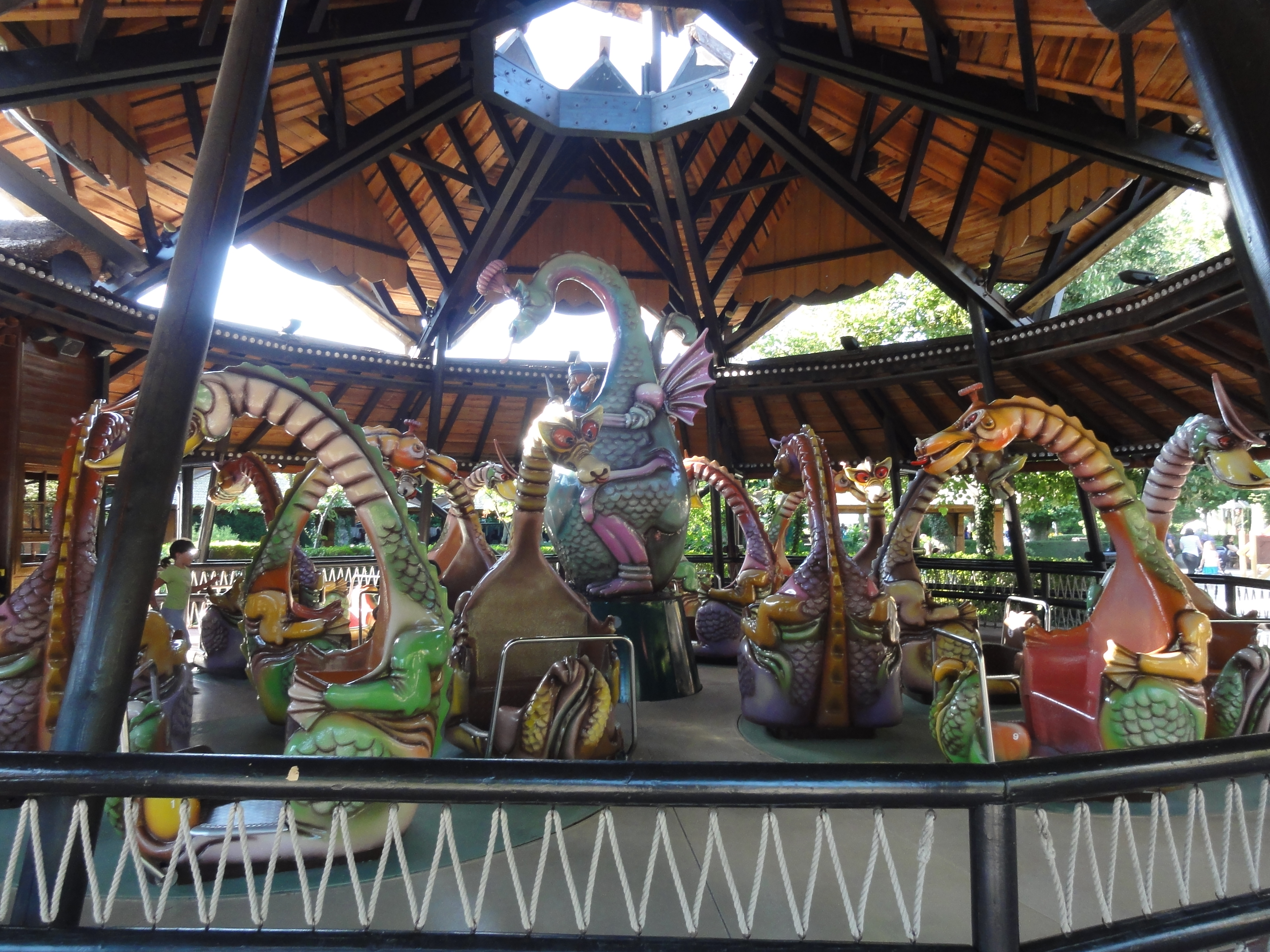 Univers des enfants, Europa-Park, Rust, Bade-Wurtemberg, Allemagne.